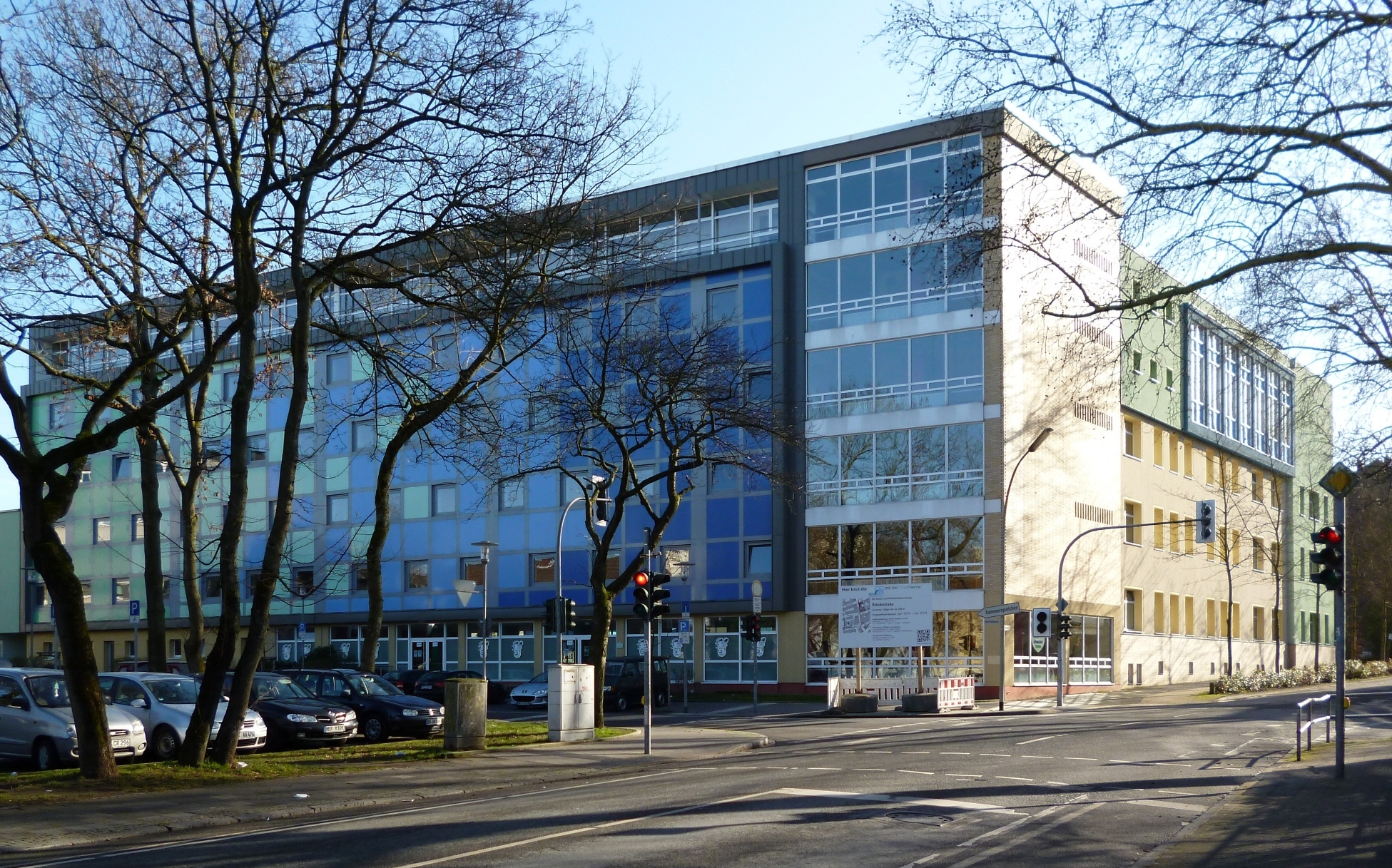 Mädchengymnasium Wanne in Herne-Wanne Februar 2014 von der Stöckstrasse gesehen